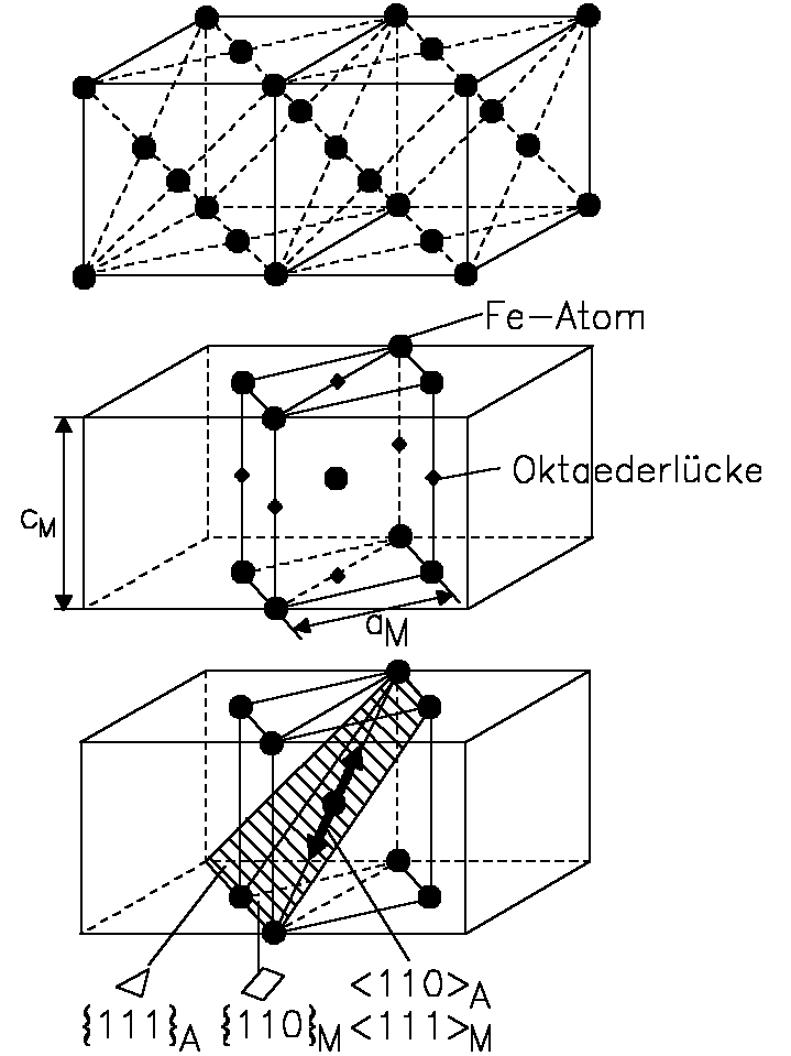 Bain'sches Modell der marten-sitischen Umwandlung